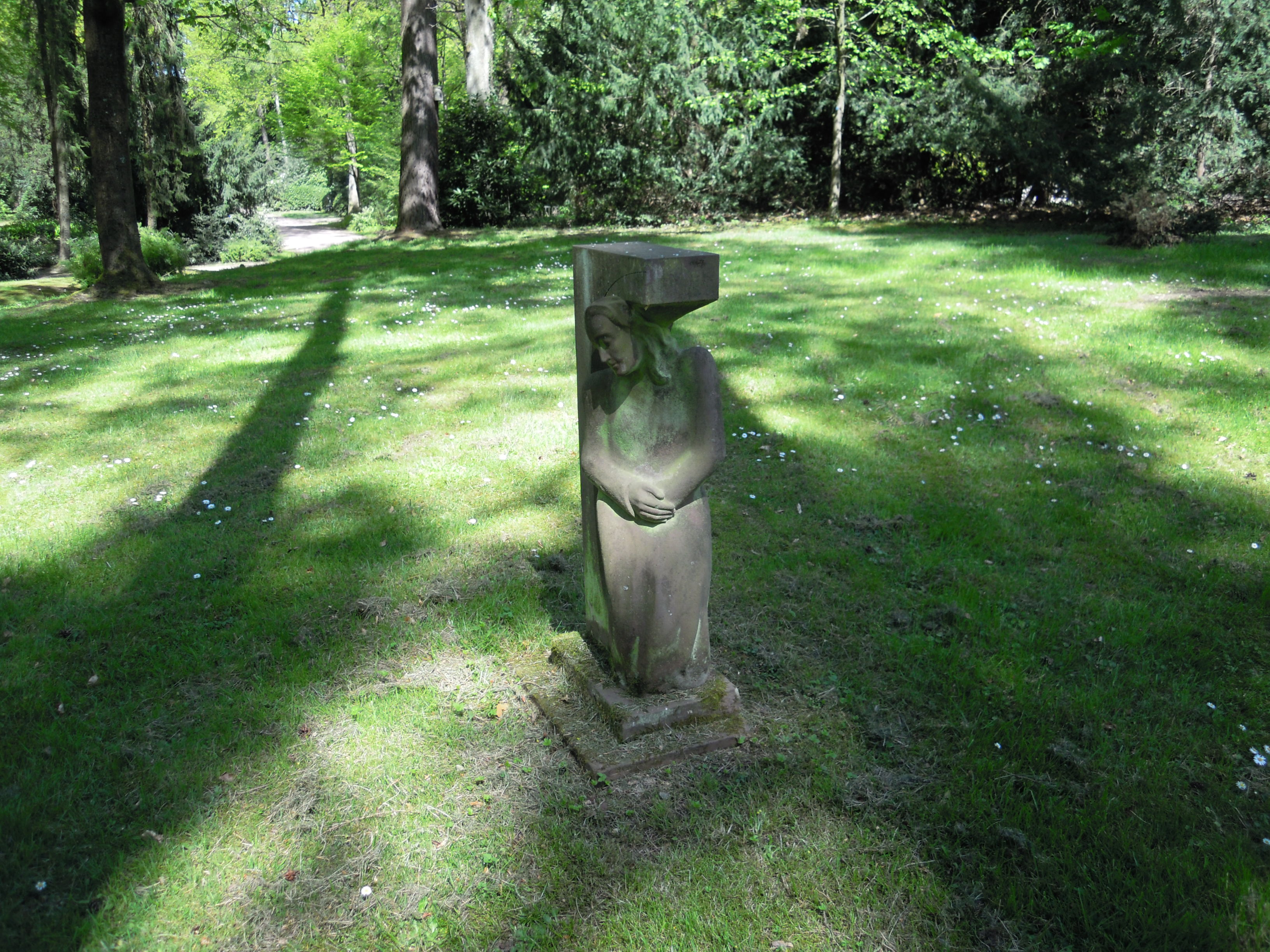 Waldfriedhof in Frankfurt-Oberrad, Burgenlandweg, Trauerhain